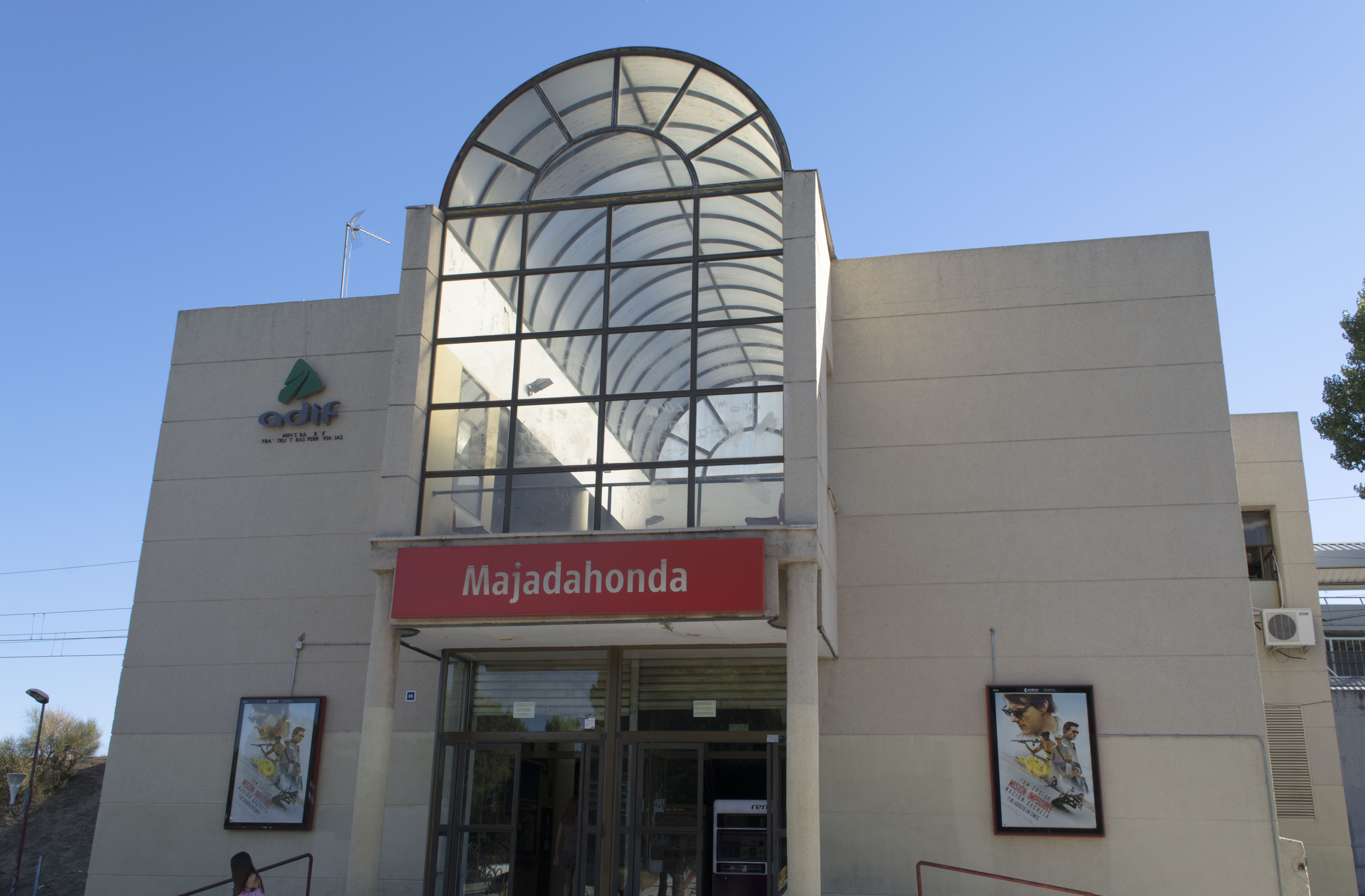 Exterior de la estación de tren de Majadahonda.